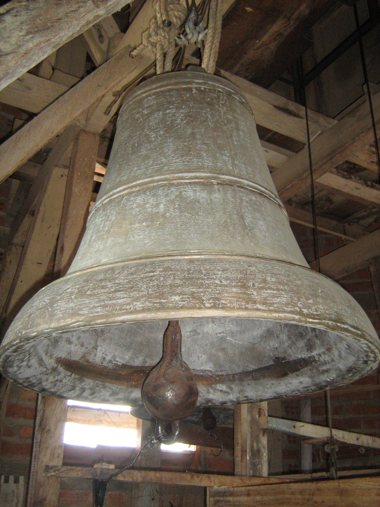 Una de las campanas de la Basílica de Yarumal, Antioquia, Colombia.